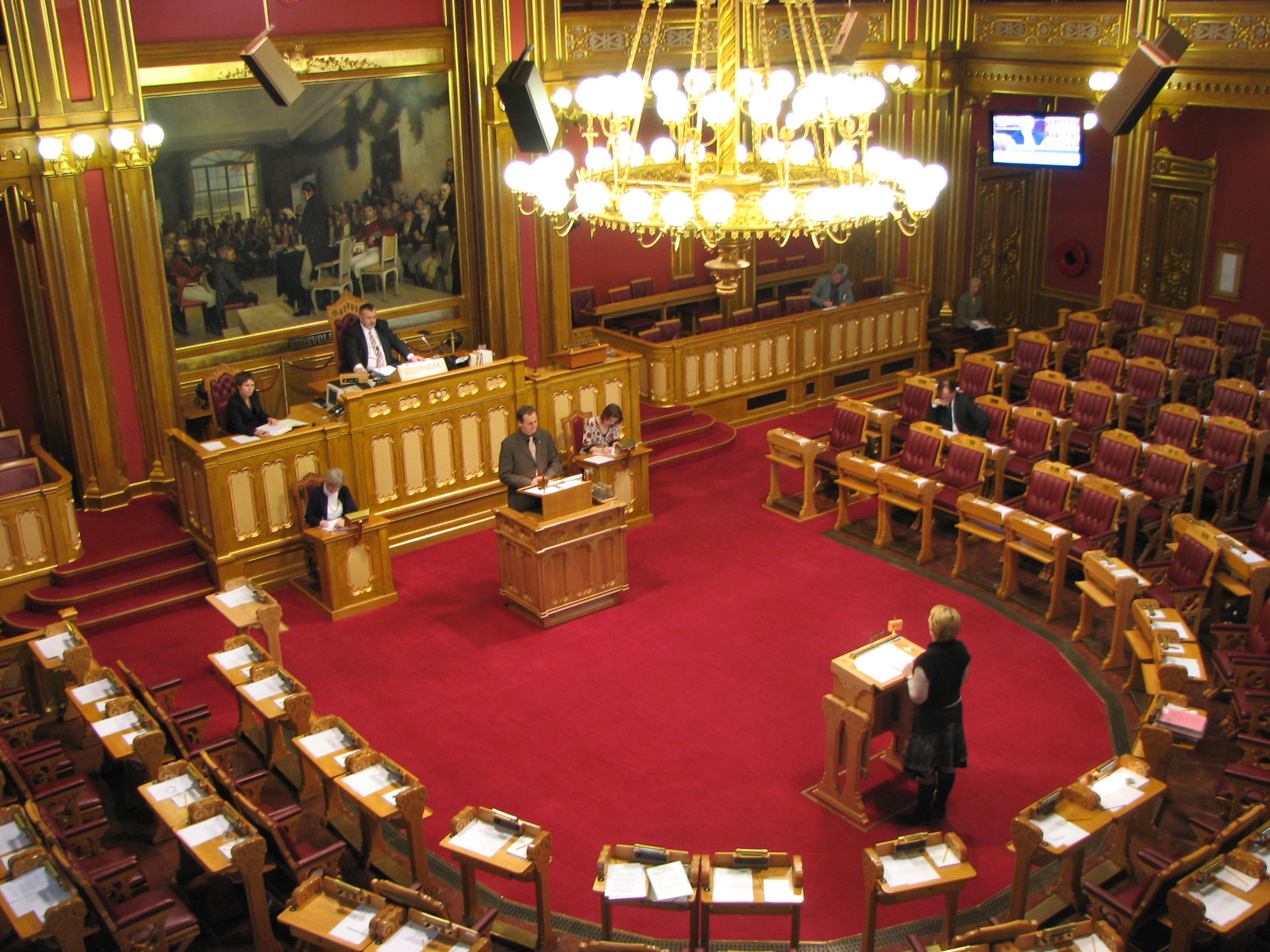 Spørretimen i Stortinget 22. november 2002, Olje og energiminister Åslaug Haga (Sp) svarer på spørsmål fra Ketil Solvik-Olsen (FrP)